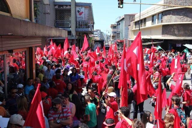 Mitín del Movimiento Libertario, Costa Rica